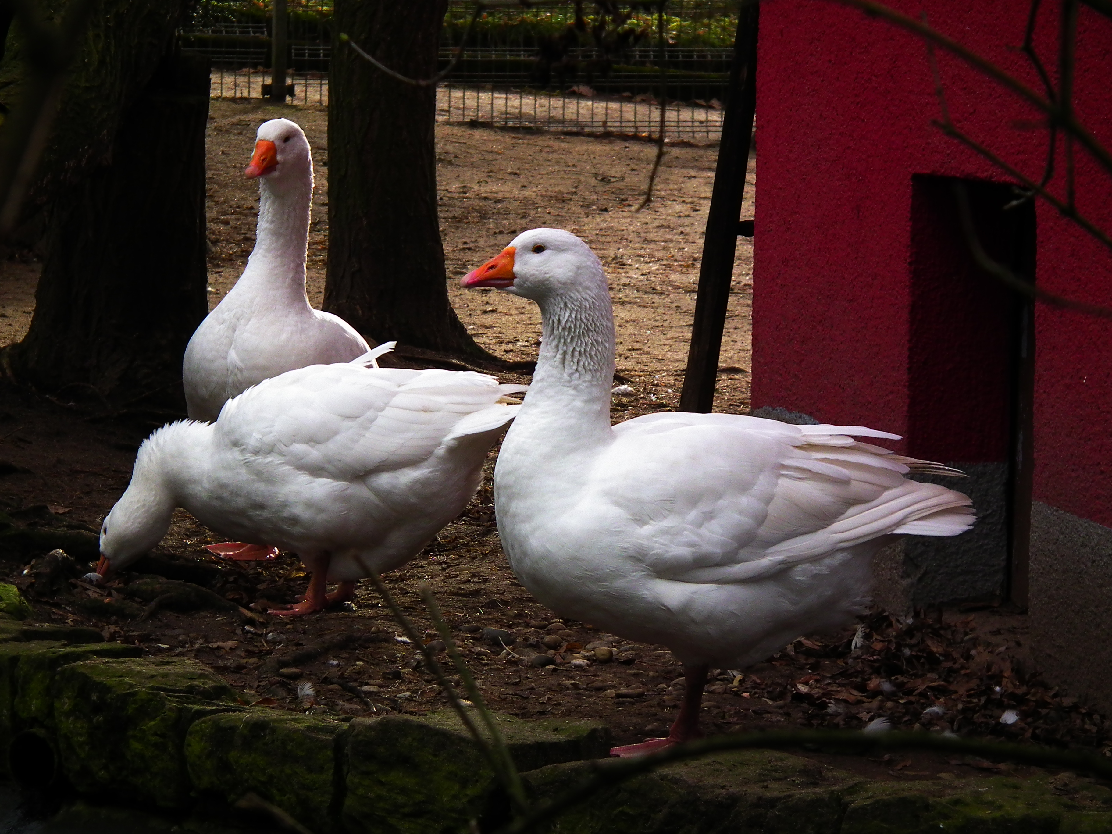 Vogelpark in Viernheim (Hessen, Deutschland)